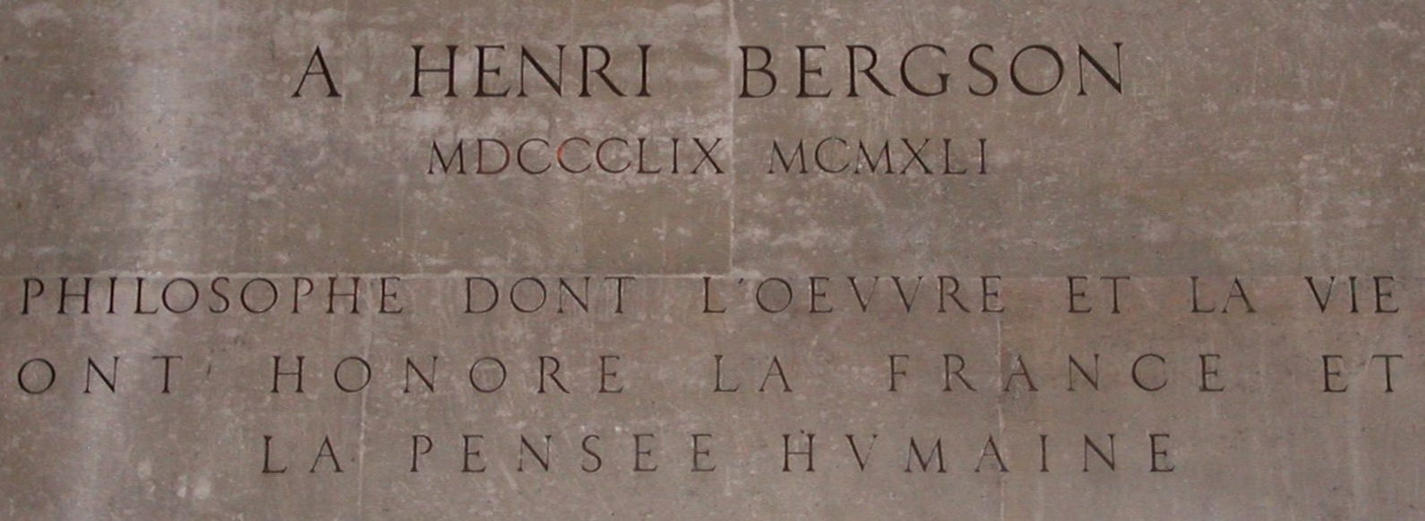 Inscription sur un pilier du Panthéon de Paris à la gloire d'Henri Bergson, philosophe Auteur Piero d'Houin, Inocybe pour Wikipédia Année 2006